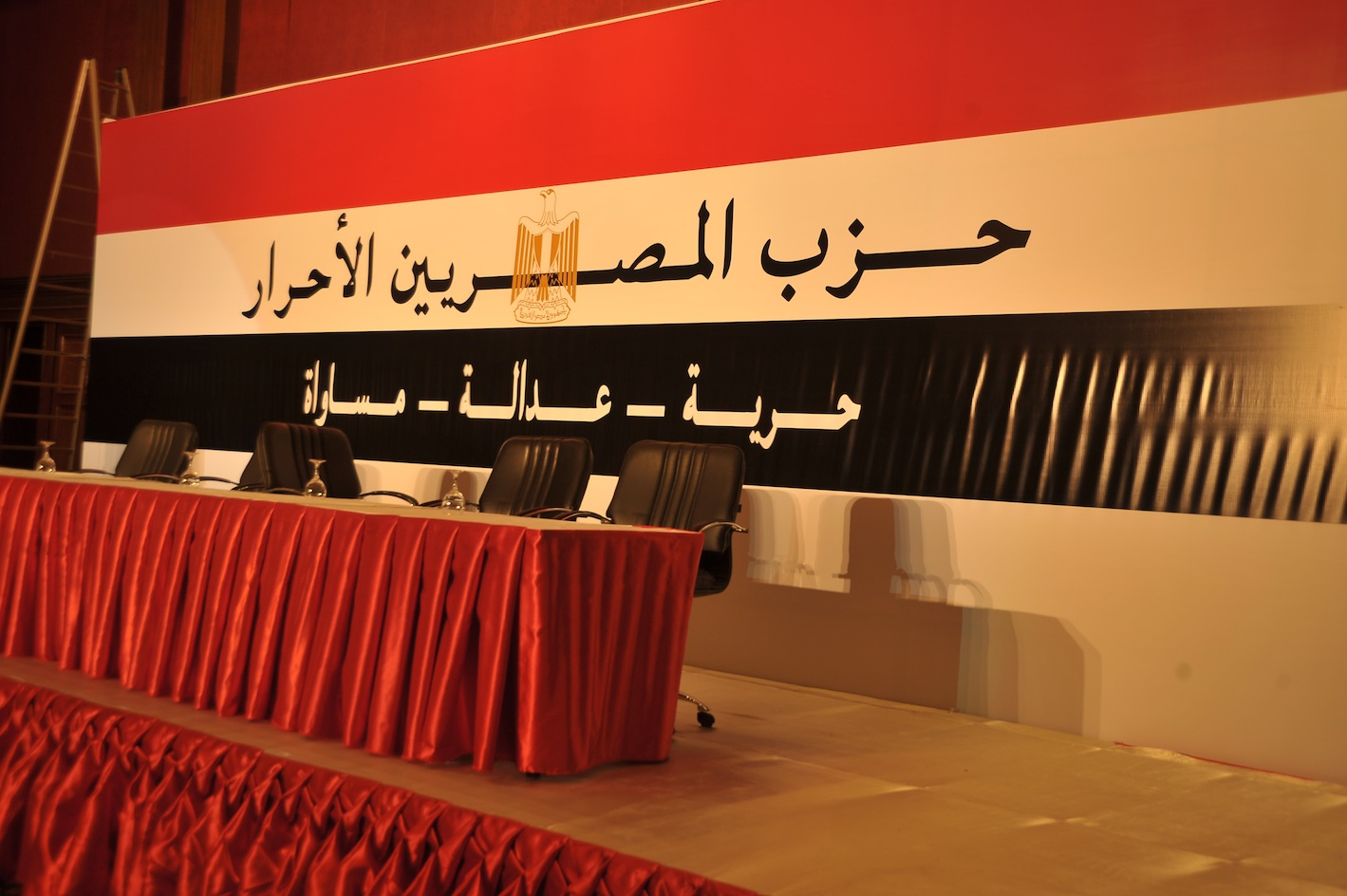 حزب المصريين الأحرار